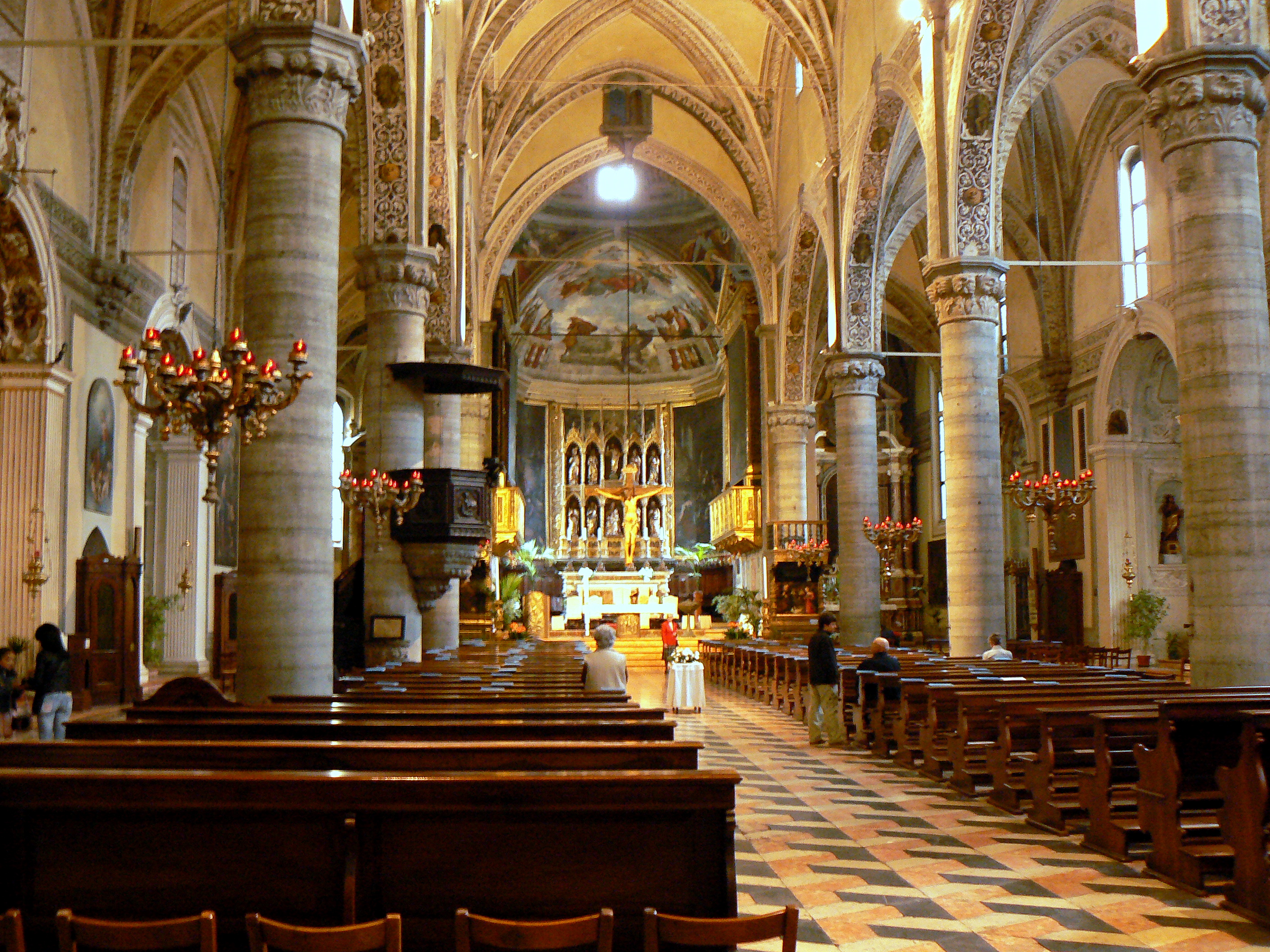 Vista interna del duomo di Salò (Brescia, Italia)